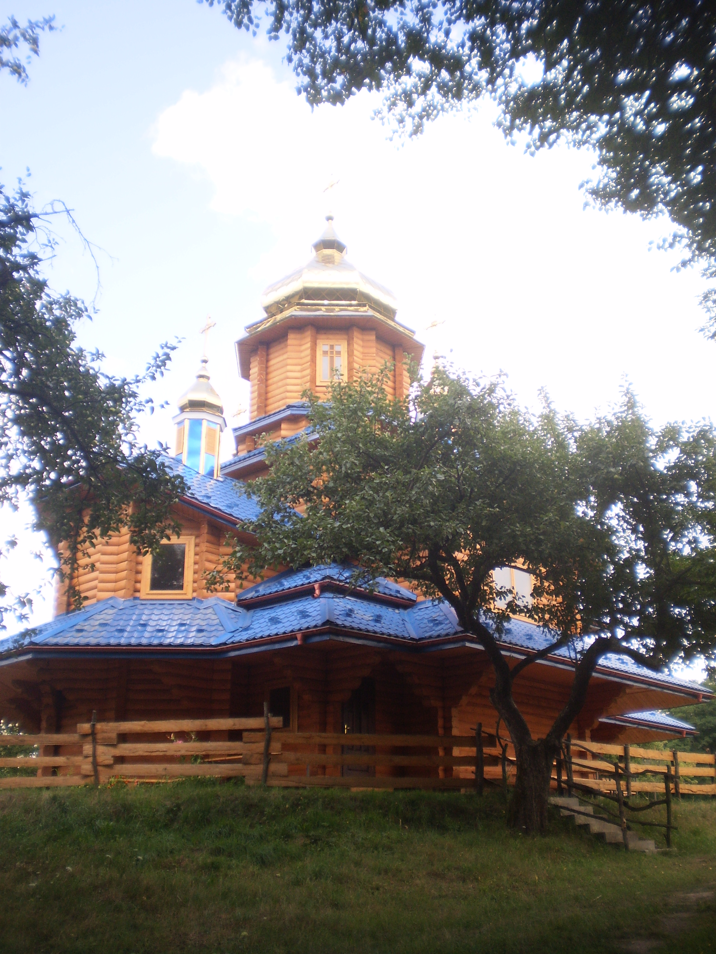 Церква Успіння Пресвятої Богородиці (дер.), Погінський монастир Успіння Матері Божої, с. Погоня